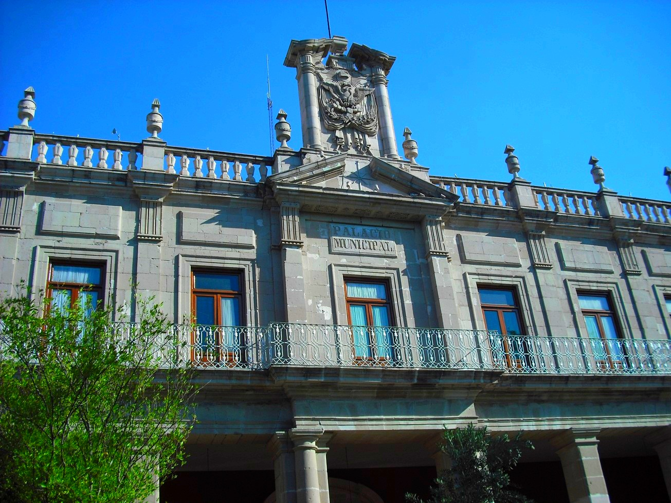 Palacio municipal de Aguascalientes